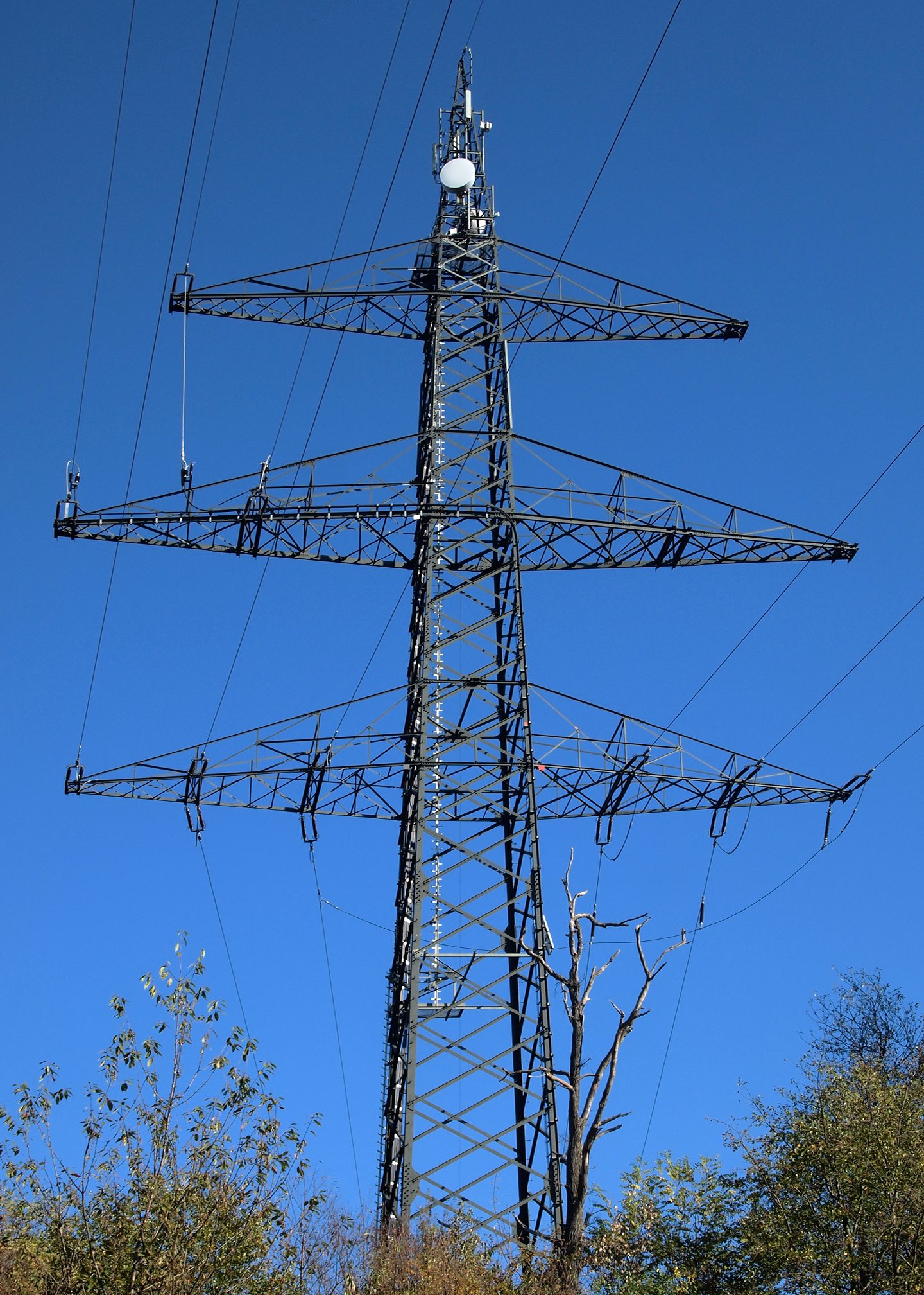 Ein Freileitungsmast auf der Wilferdinger Höhe in Pforzheim. Er hat Platz für zwei Höchspannungs- und zwei Hochspannungssysteme. Aufgelegt sind bis hierhin drei Hochspannungssysteme. Davon ist eines Mittelspannung und geht hier in ein Erdkabel über. Von den beiden anderen gehen überraschend vier Seile weiter. Er soll die geplante 380kV-Leitung Ötisheim–Birkenfeld tragen. [1]